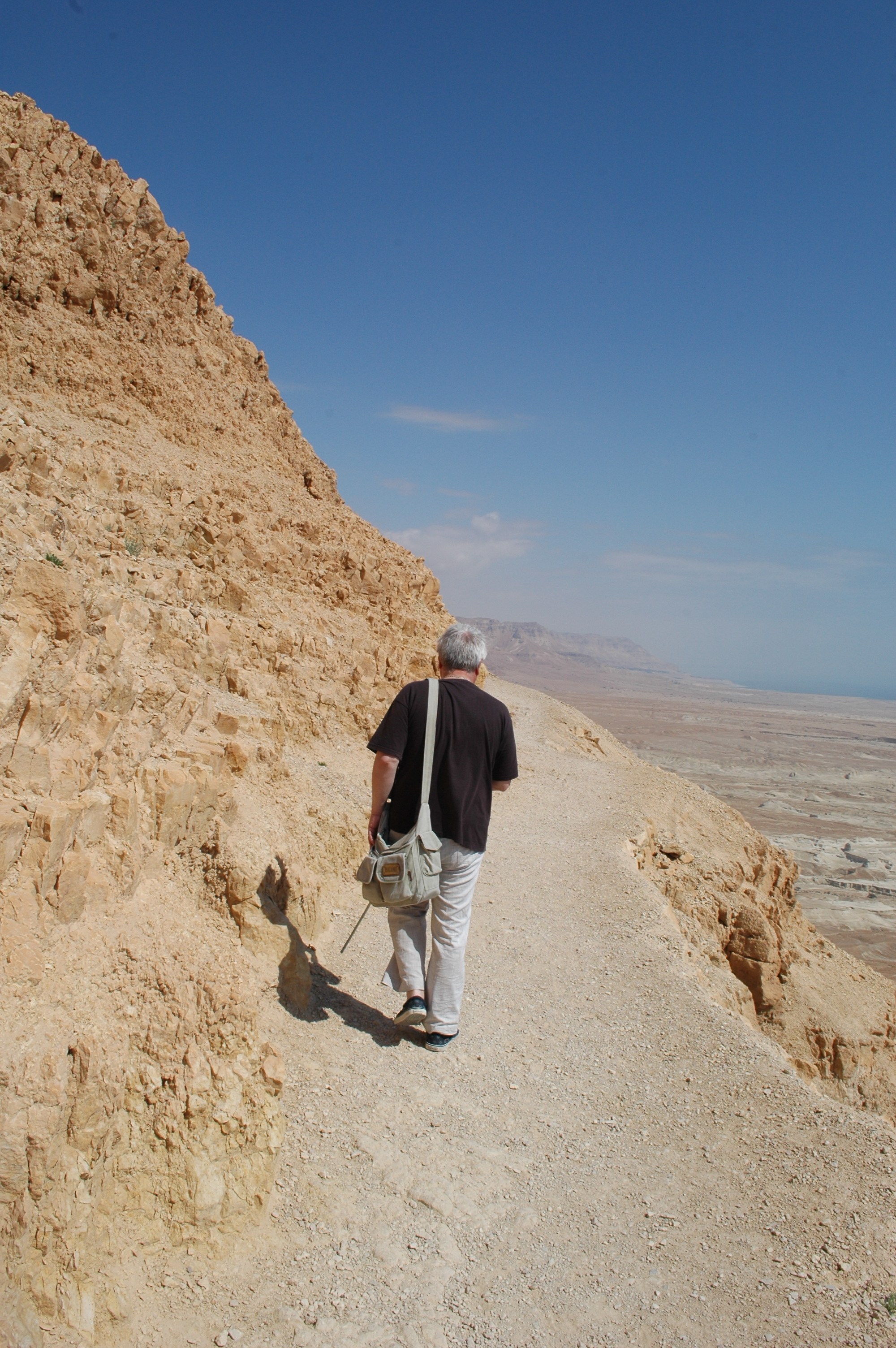 30 березня 2016 року В.Б. Петровський без сторонньої допомоги, за виключенням дистанційного керування з відстані 10-15 метрів за допомогою лише голосу) піднявся на фортецю Масада так званою «гадючою стежиною» і самостійно спустився вниз тією ж стежкою.